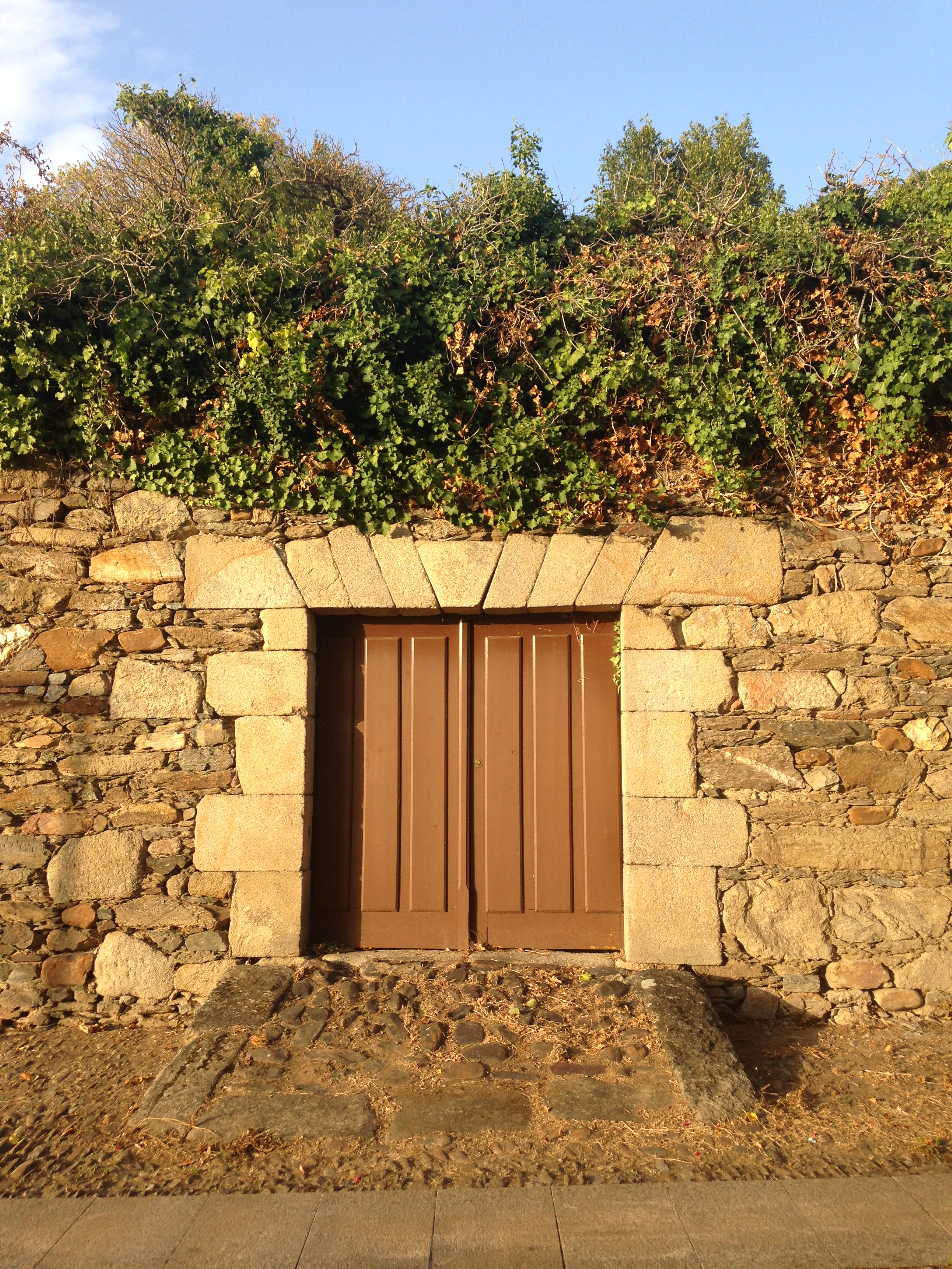 Porta de onde se pensa puido estar a antiga sinagoga de Monforte de Lemos.